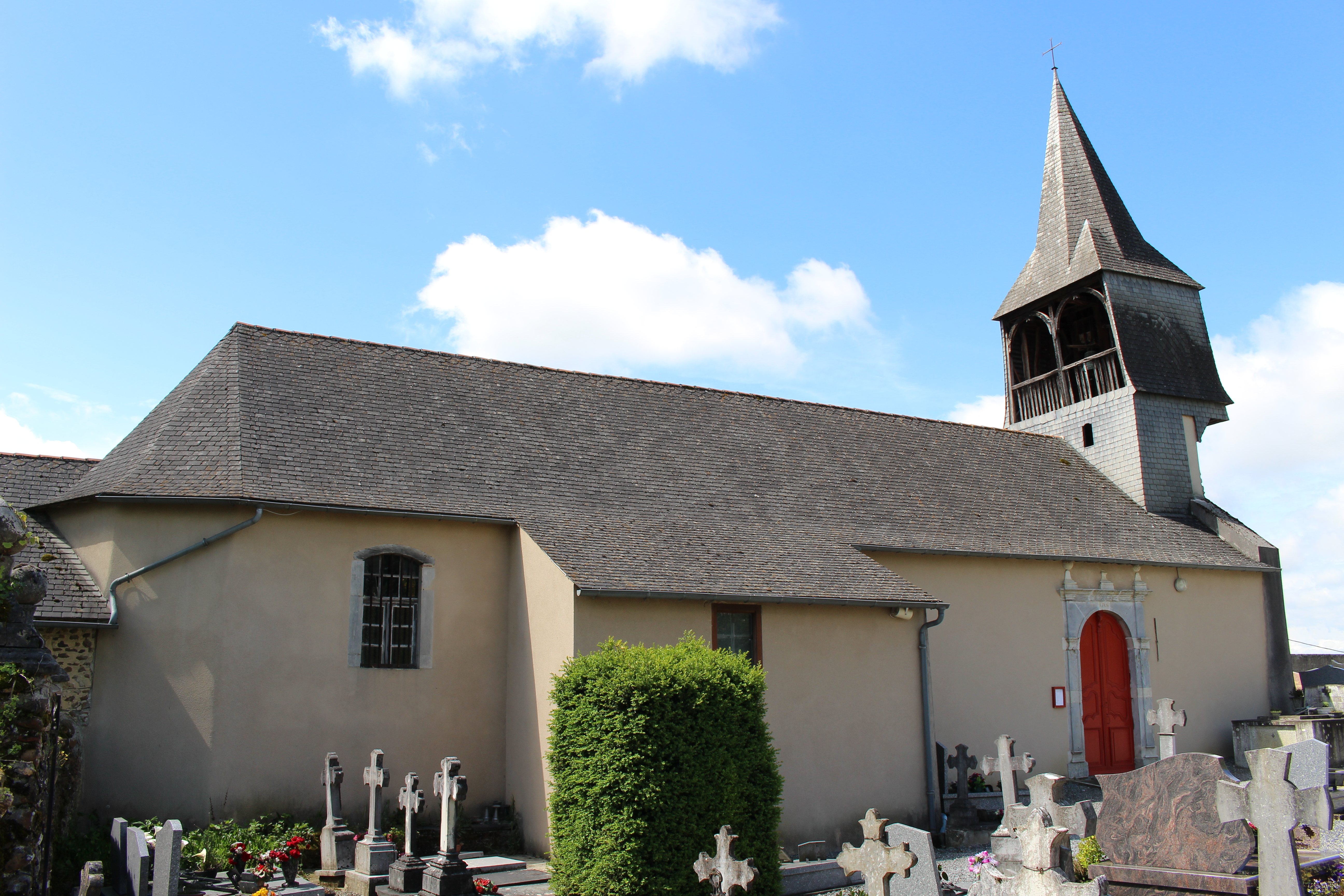 Église Notre-Dame-de-l'Assomption de Barbazan-Dessus (Hautes-Pyrénées)